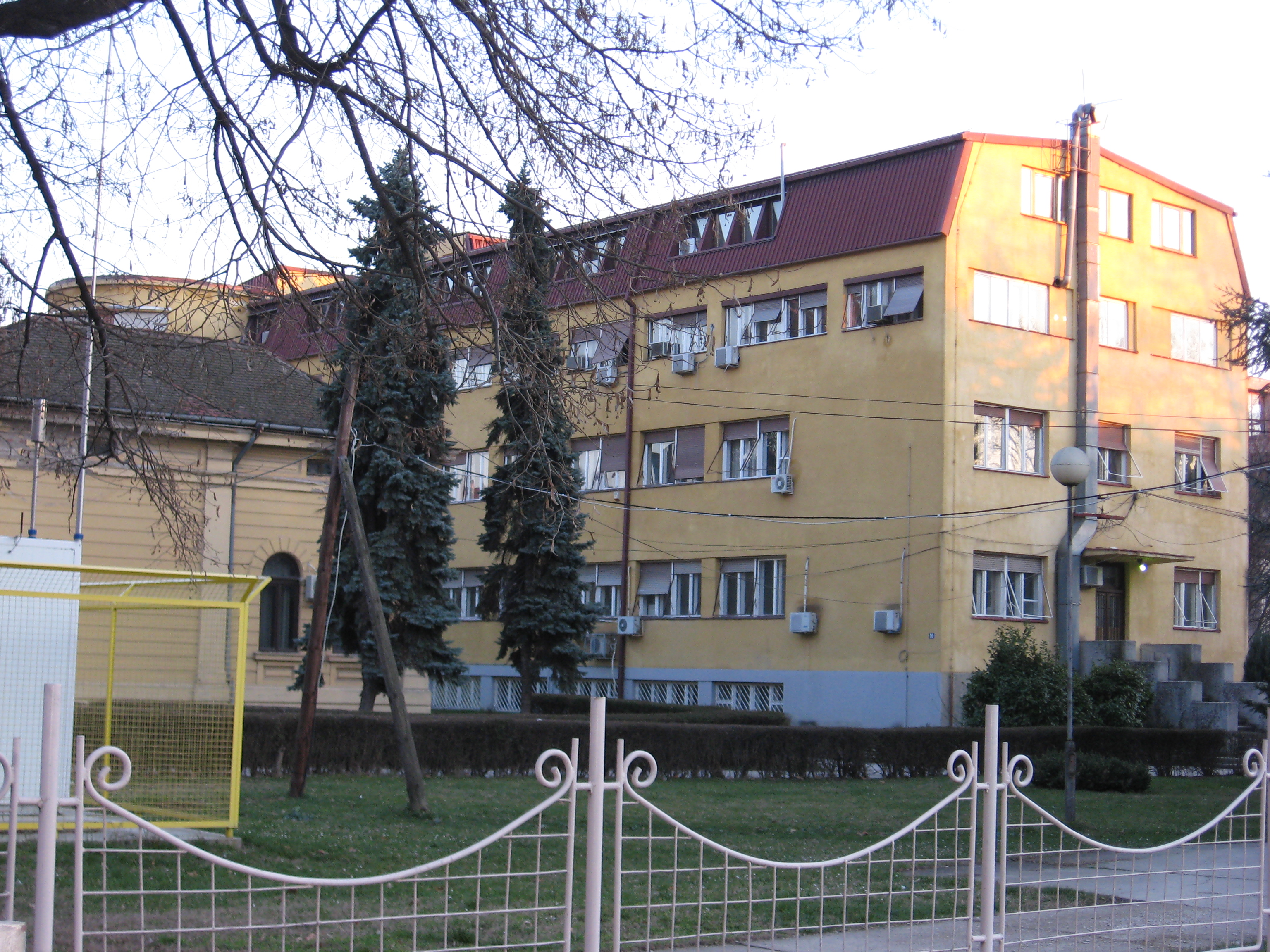 Zavod za zdravstvenu zaštitu zaposlenih Niš